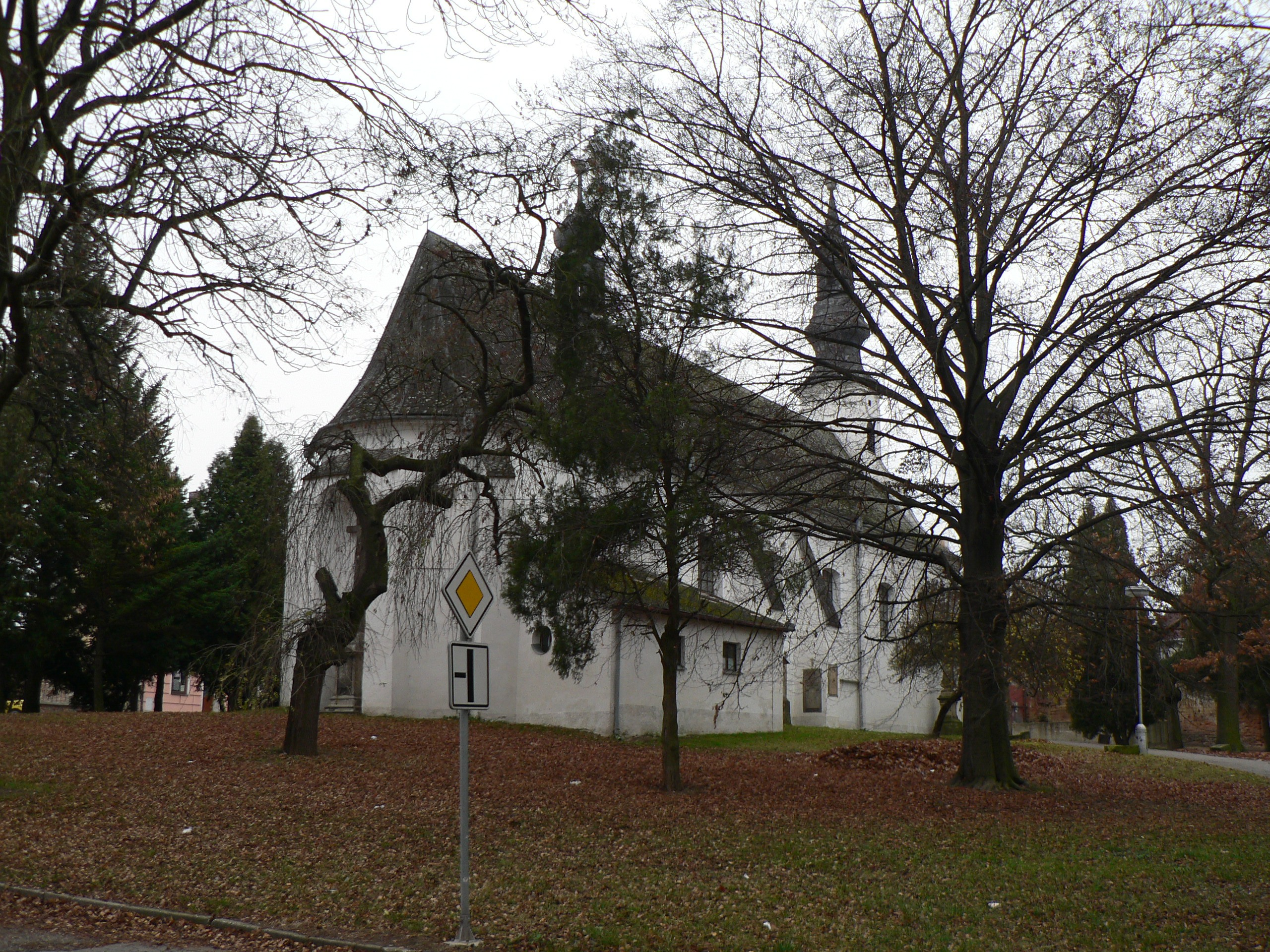 Kostel svatého Stanislava (Mohelnice)